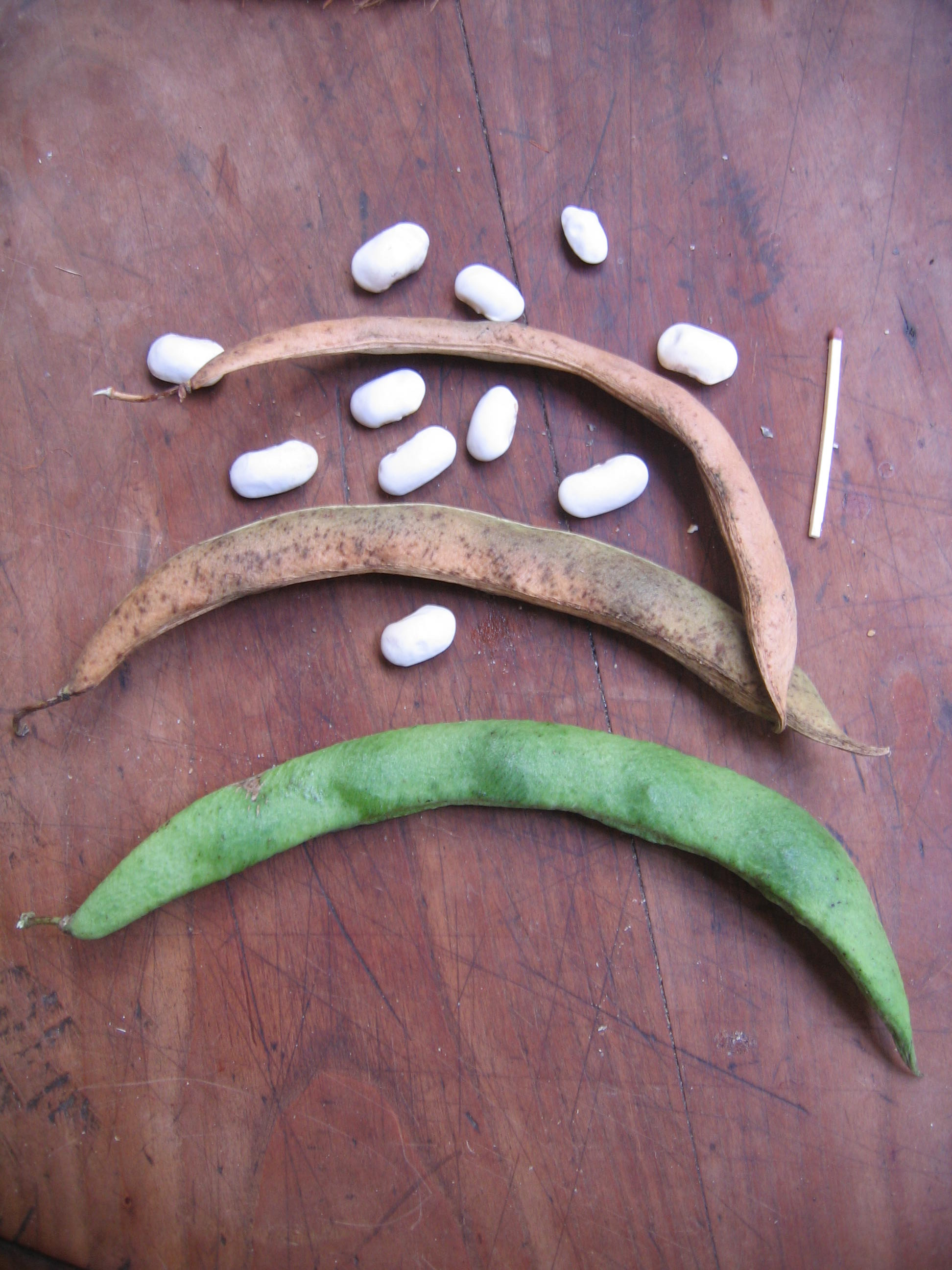 Gousses de taupard du Limousin et grains (petits).